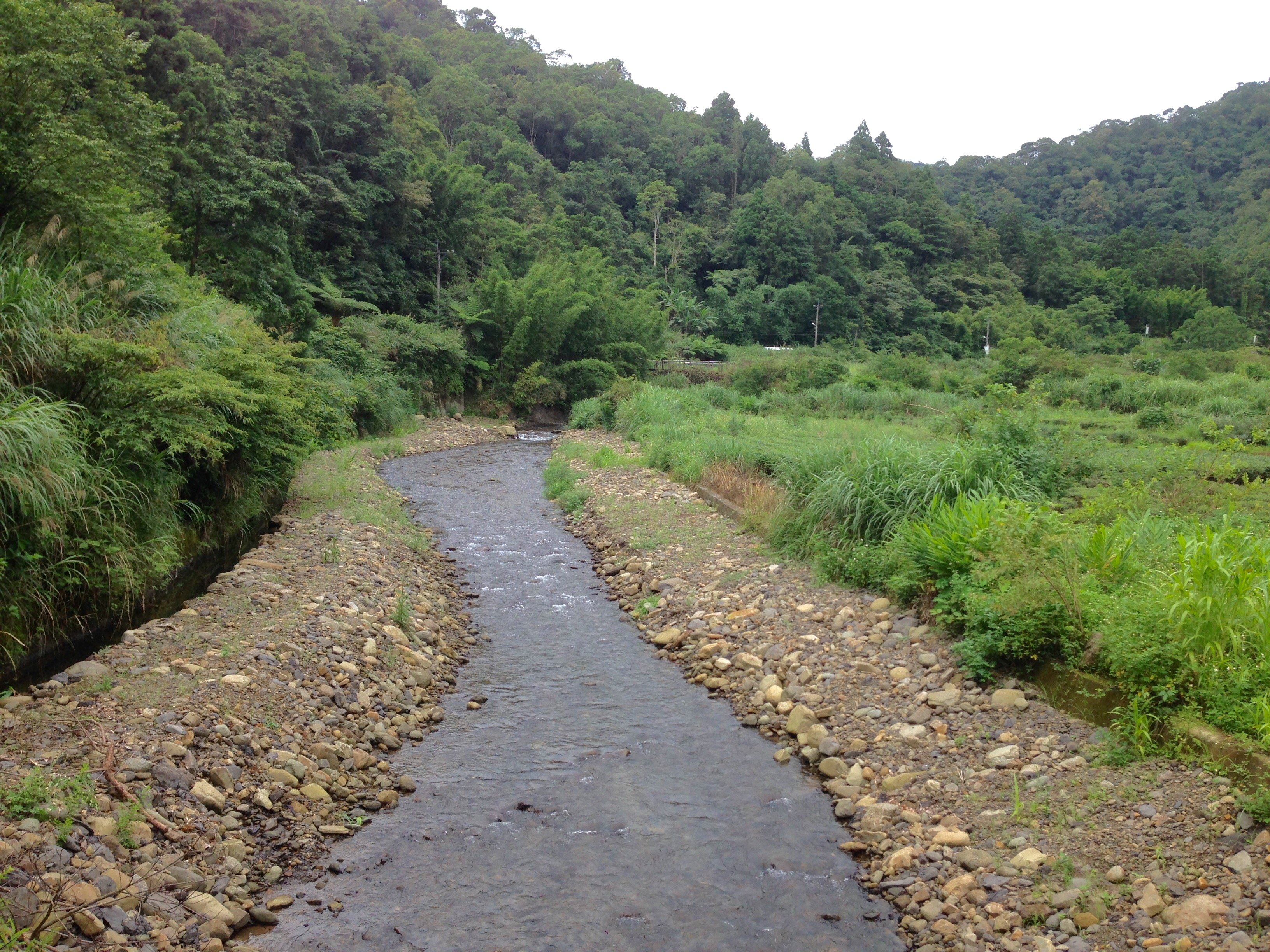 金瓜寮溪上游